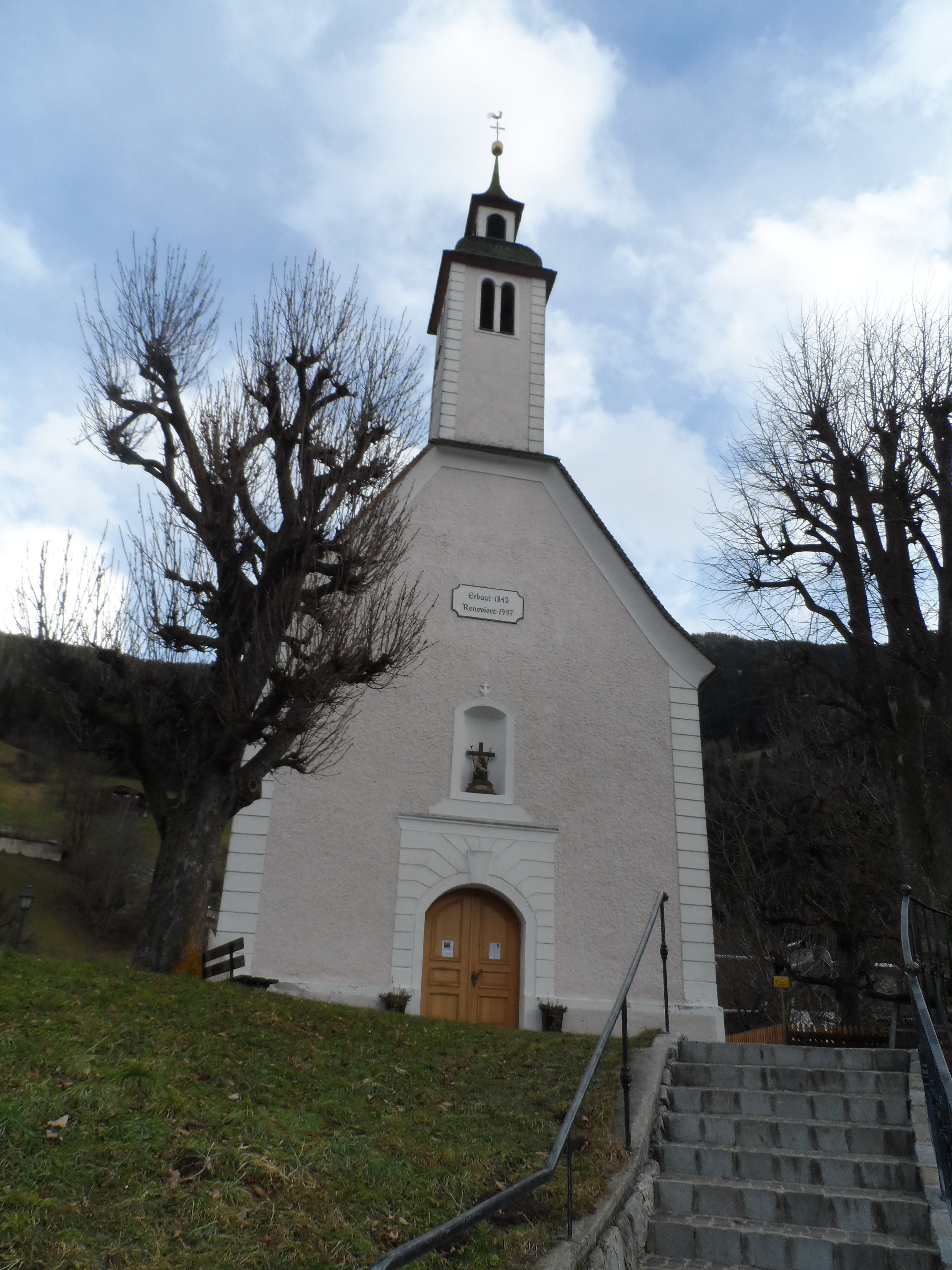 Kath. Filialkirche Maria sieben Schmerzen - Ramsau im Zillertal